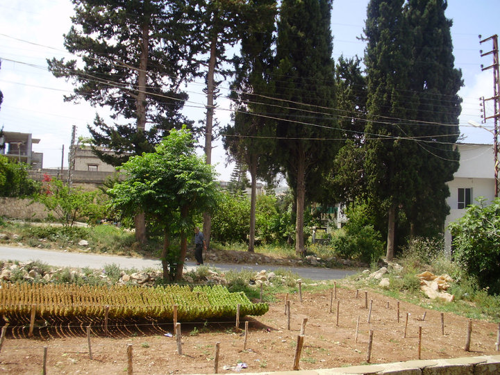 نشر التبغ لتجفيفه بعد قطفه تمهيدا لتصنيعه - بلدة عبا جنوب لبنان